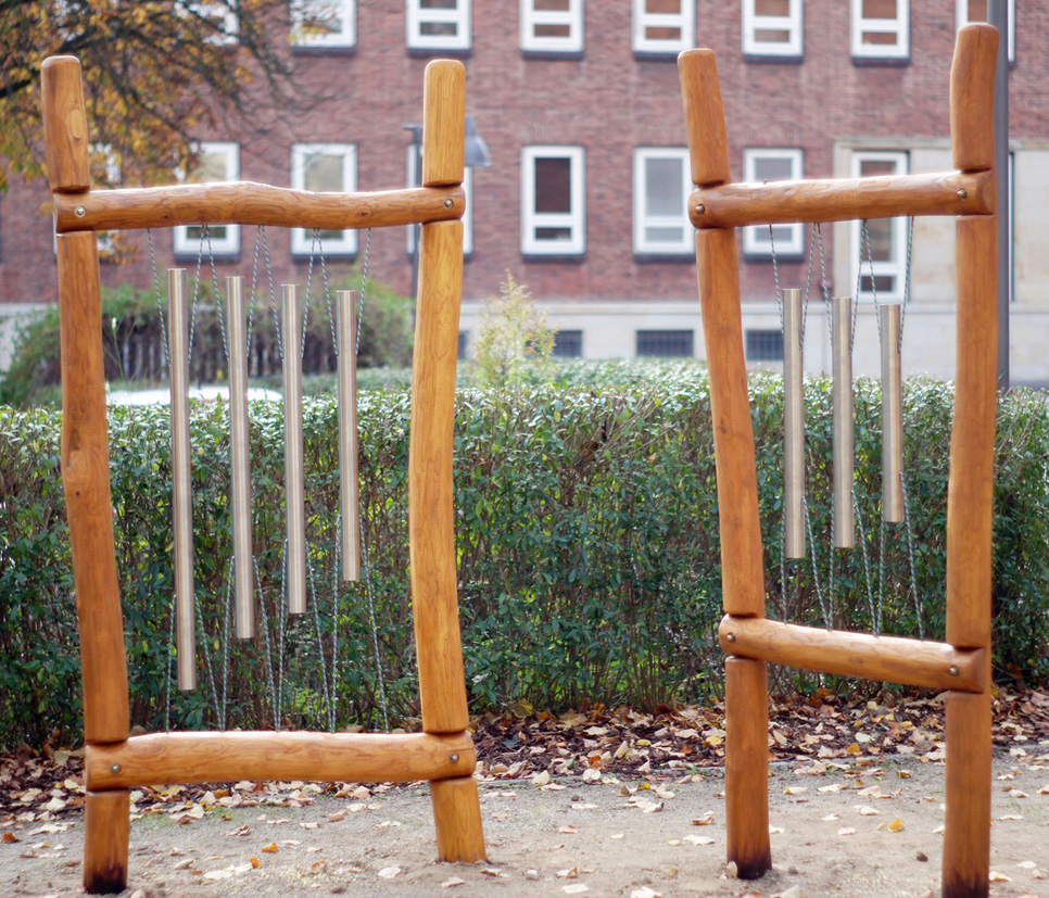 Musiculum Metallroehrenspiel